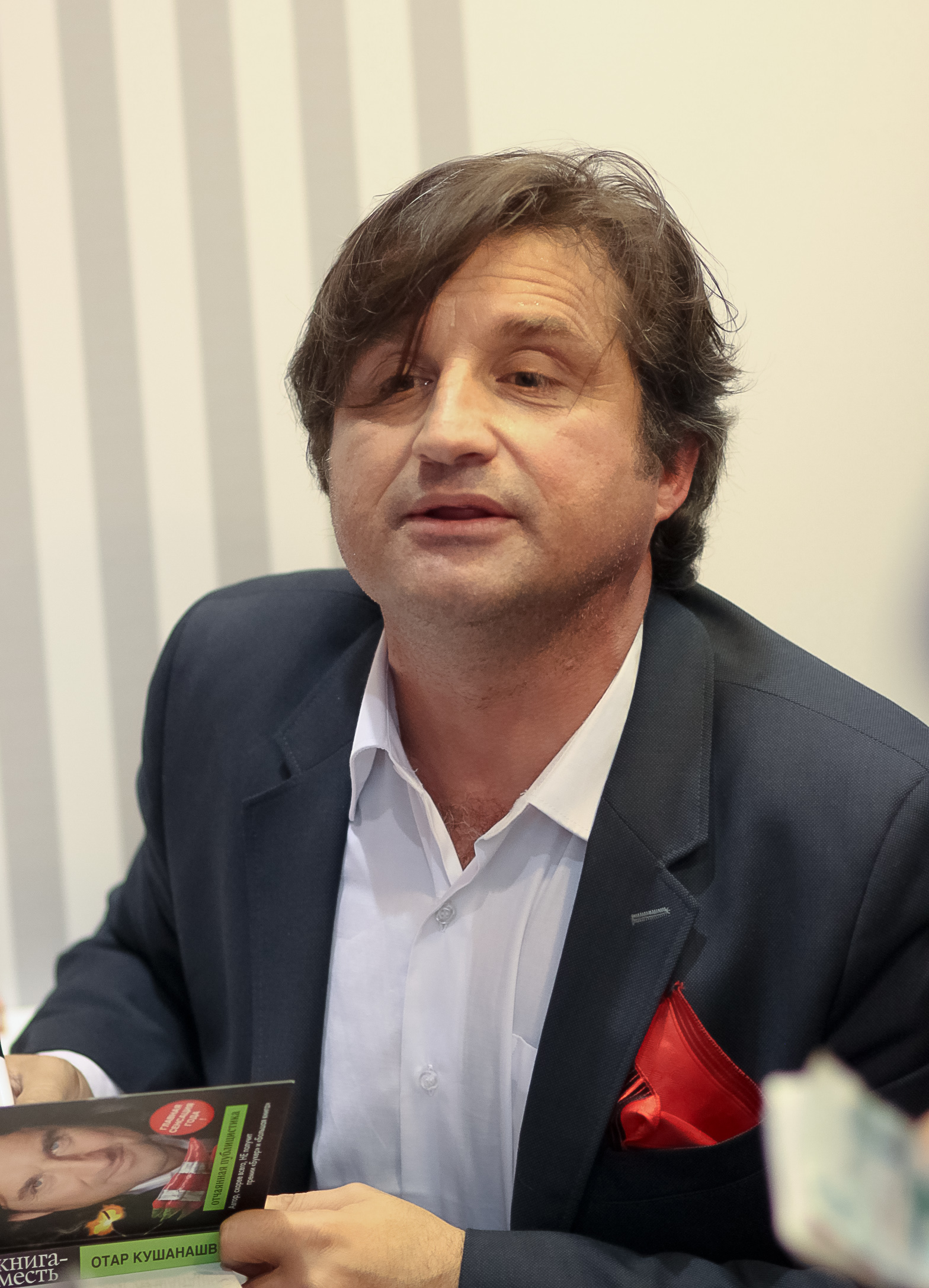 Отар Кушанашвили